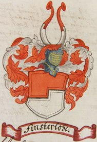 Wappen des ausgestorbenen fränkischen Adelsgeschlechtes von Finsterlohe (auch Finsterloh, Vinsterloh)